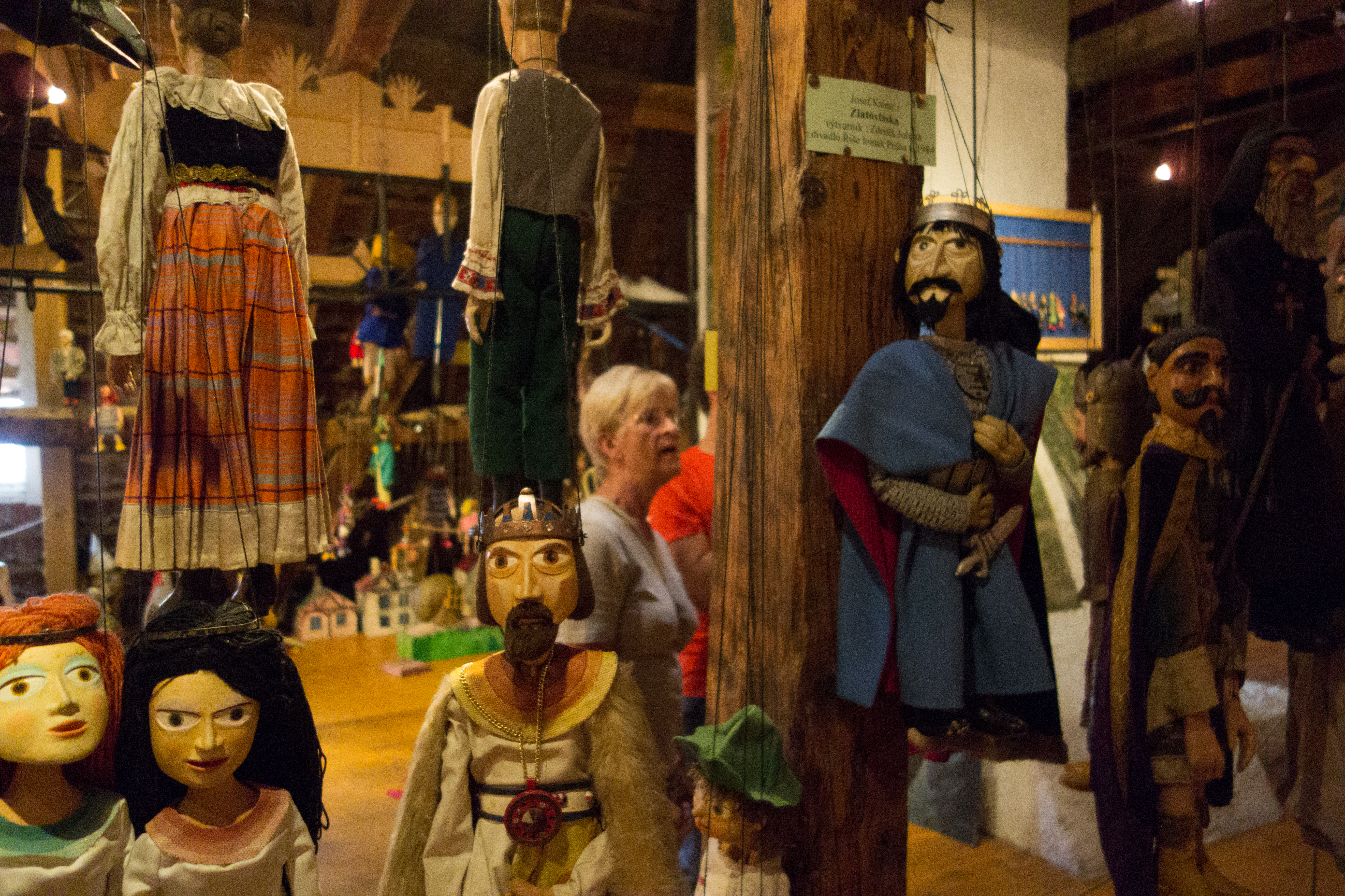 Marionetki w Muzeum Marionetek w Czeskim Krumlovie